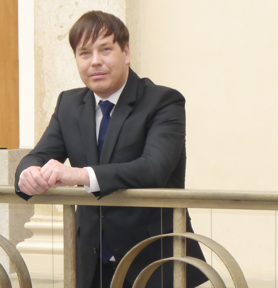 Florian Kluckert, MdA von Berlin